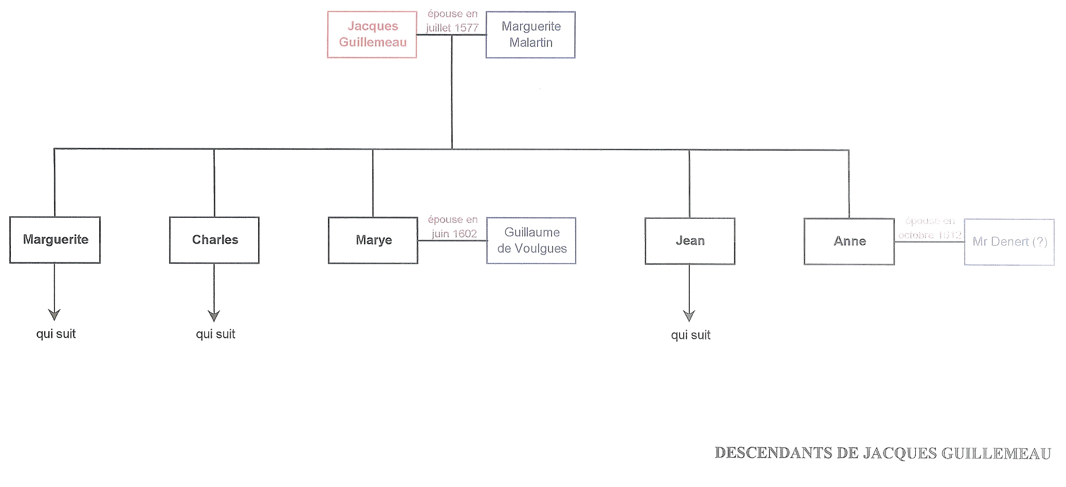 "savoir faisons que le traité du mariage de maître Jacques Guillemeau, Chirurgien du roi et Juré à Paris, fils de deffunct et honorable Maître Jacques Guillemeau, Chirurgien du roi, demeurant à Orléans avec Marguerite Malartin, fille d'honorable gen Malartin"